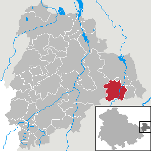 Ziegelheim in Thuringia - District Altenburger Land